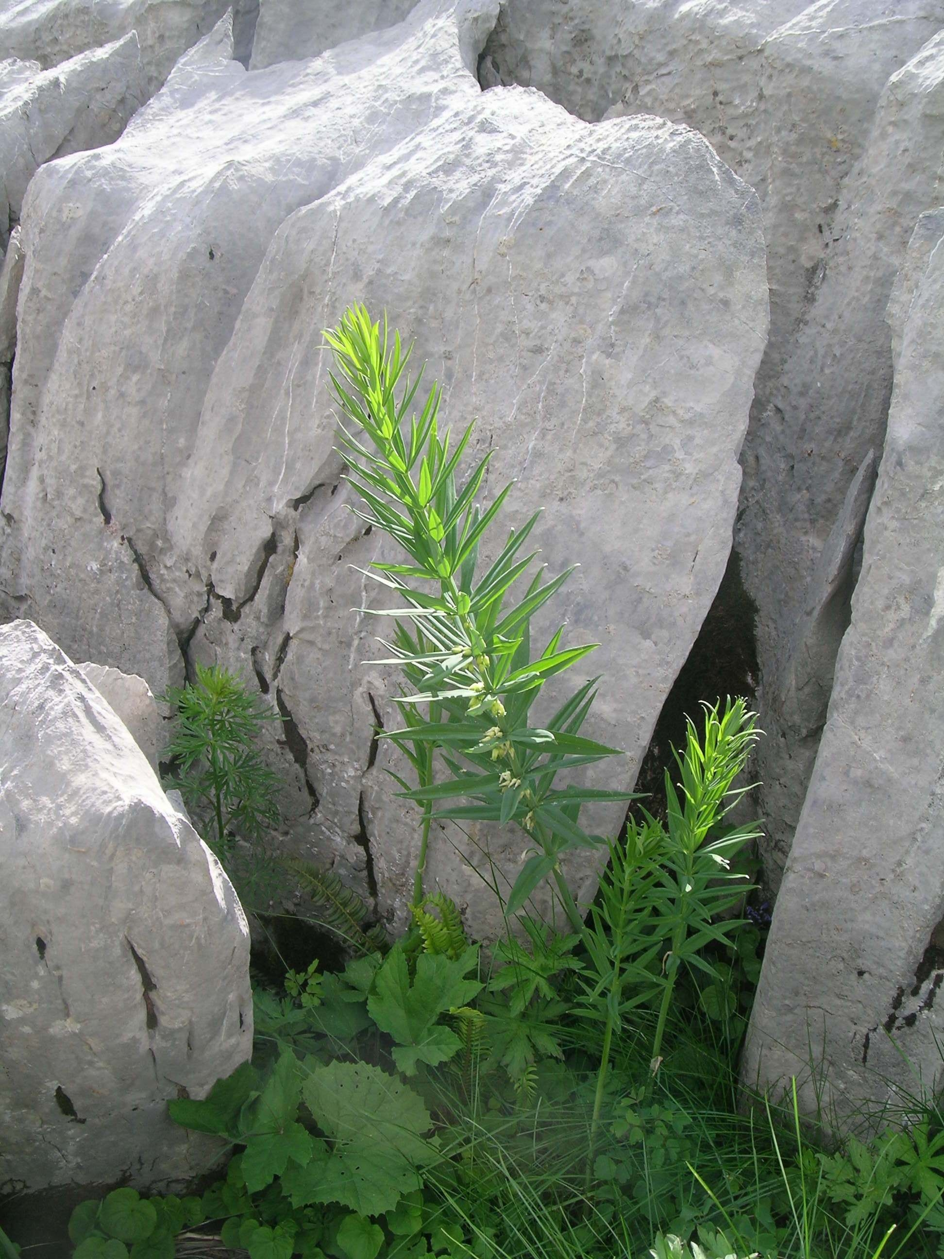 Polygonatum verticillatum, Schynige Platte, Kanton Bern, Schweiz